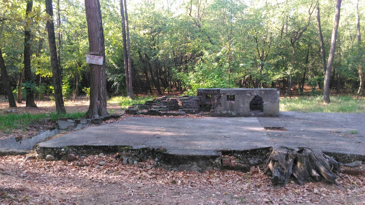 Cucina da campo tedesca sulla via Gaggio a Lonate Pozzolo.